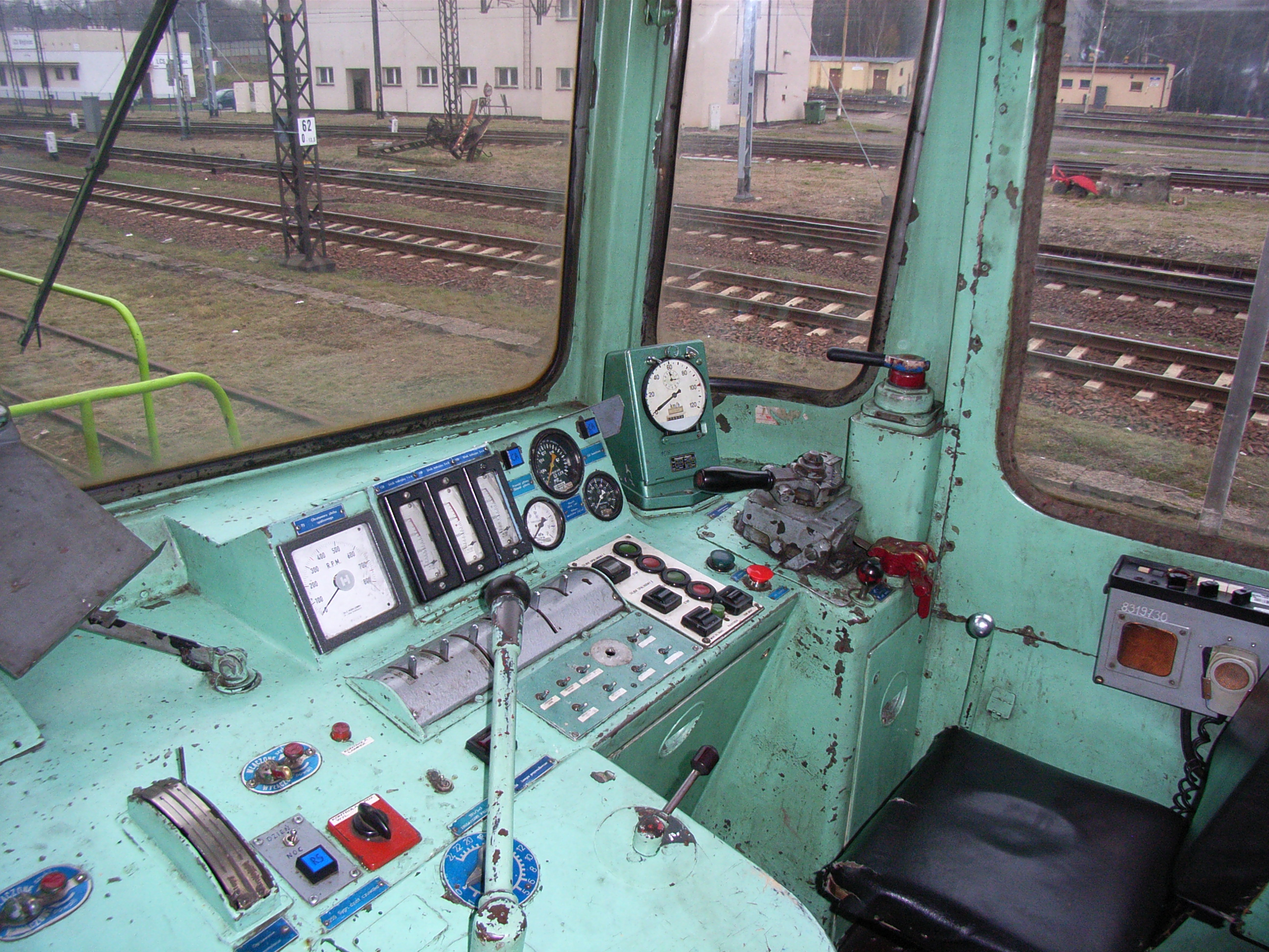 Führerstand der PKP-Güterzugdiesellokomotive ST43